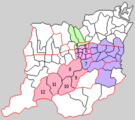 徳島県名西郡の町村制時点の町村。